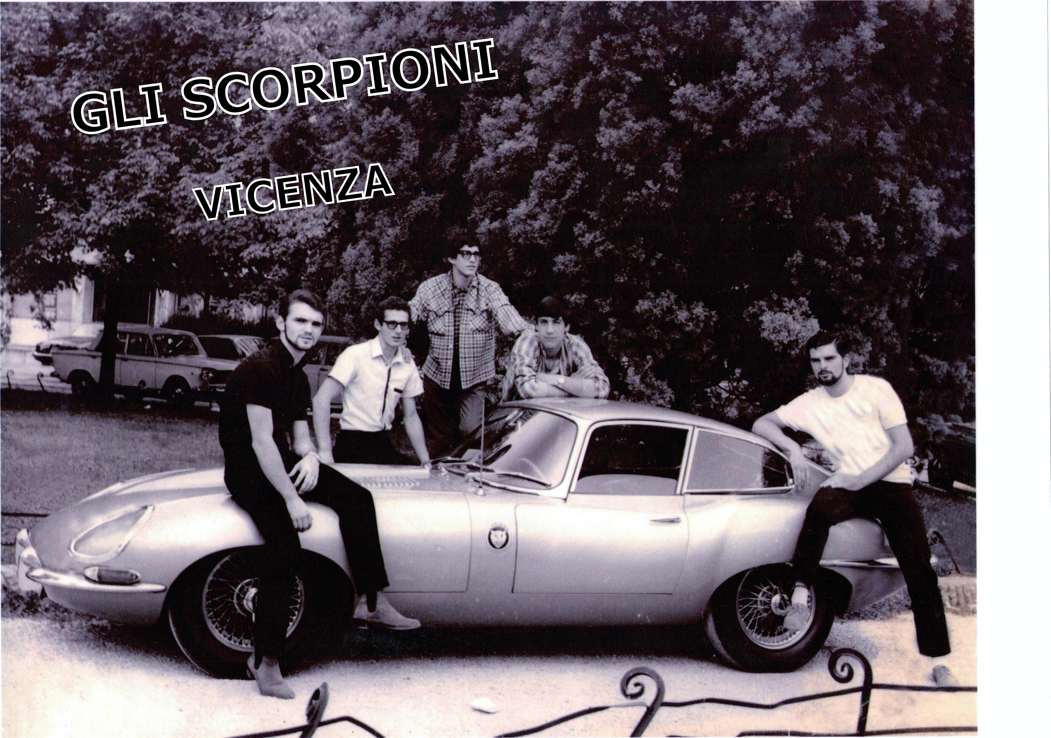 Gruppo vicentino degli anni 60